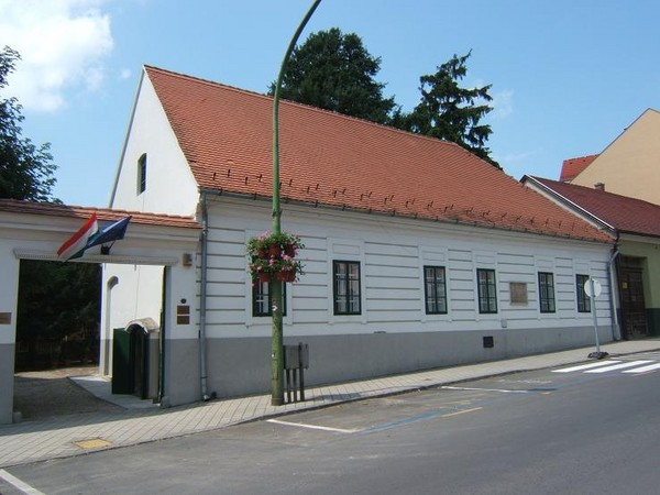 Vaszary János szülőháza Kaposváron